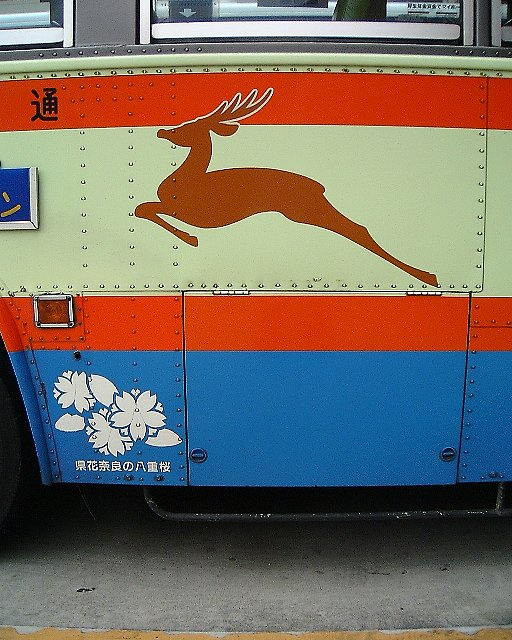 奈良交通 旧塗色車側面の「鹿マーク」 五條バスセンターにて